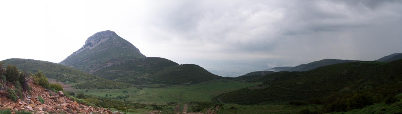 Composición de fotos de la Sierra de Gratal